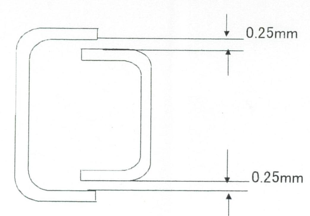 பாகங்களை இணைக்கும்போது